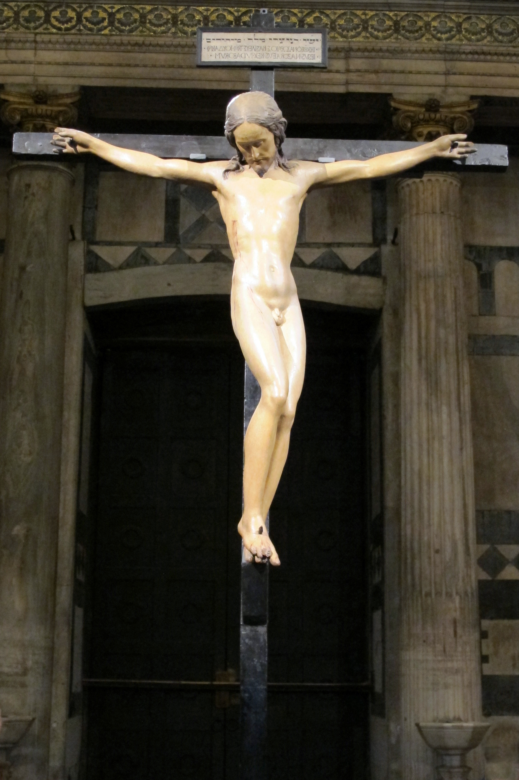 Installazione florens 2012 crocifisso michelangelo